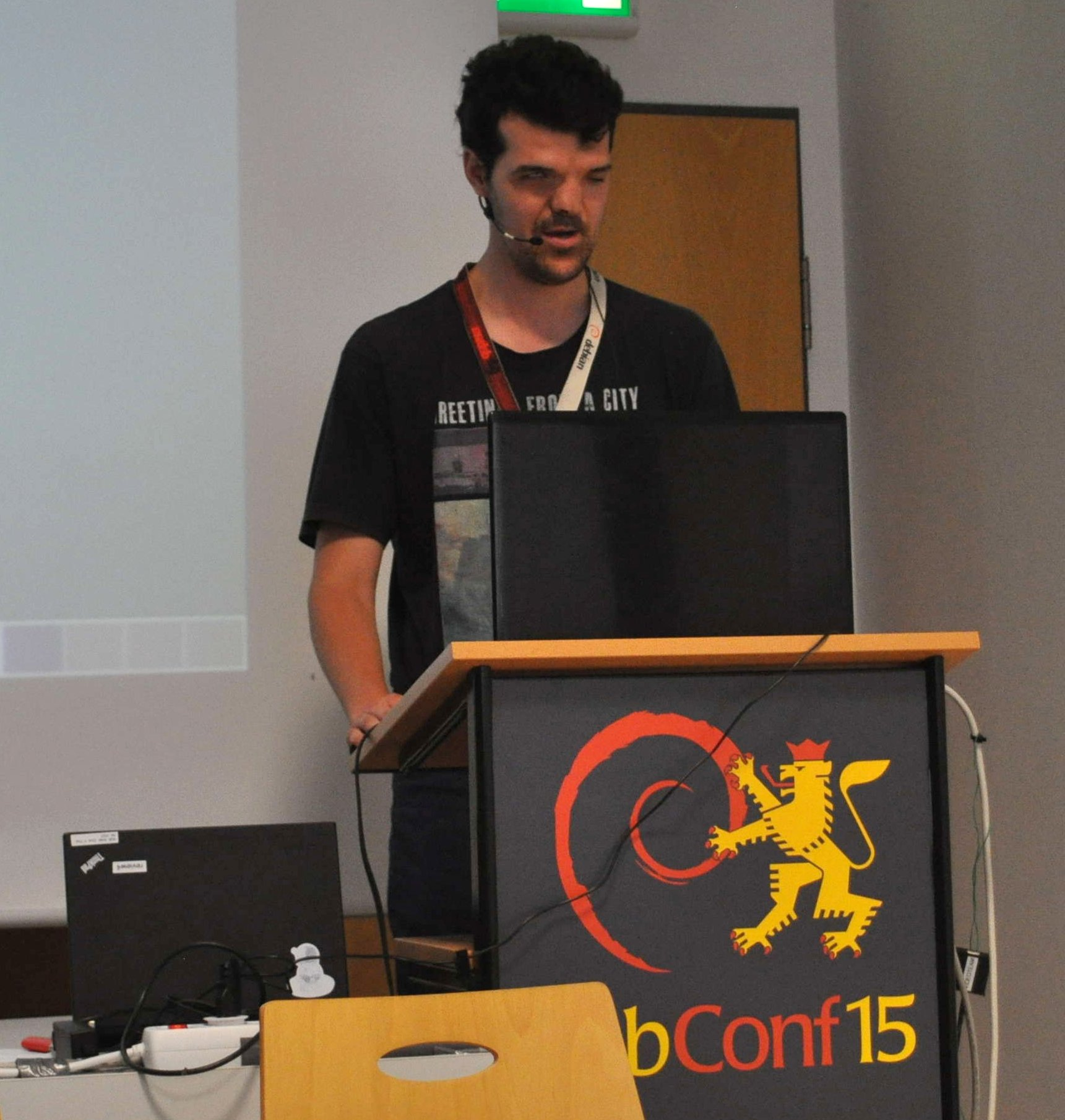 Jean-Philippe MENGUAL, en conférence